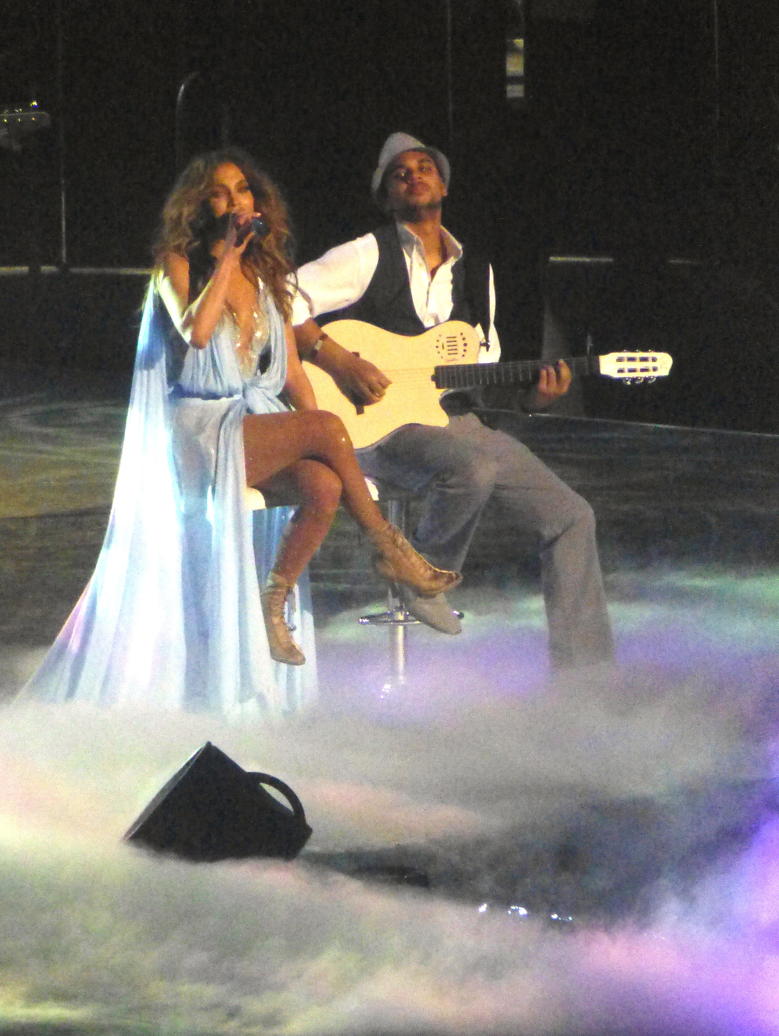 Jennifer LOPEZ en concert à Paris Bercy dans le cadre du " DANCE AGAIN WORLD TOUR " en OCTOBRE 2012